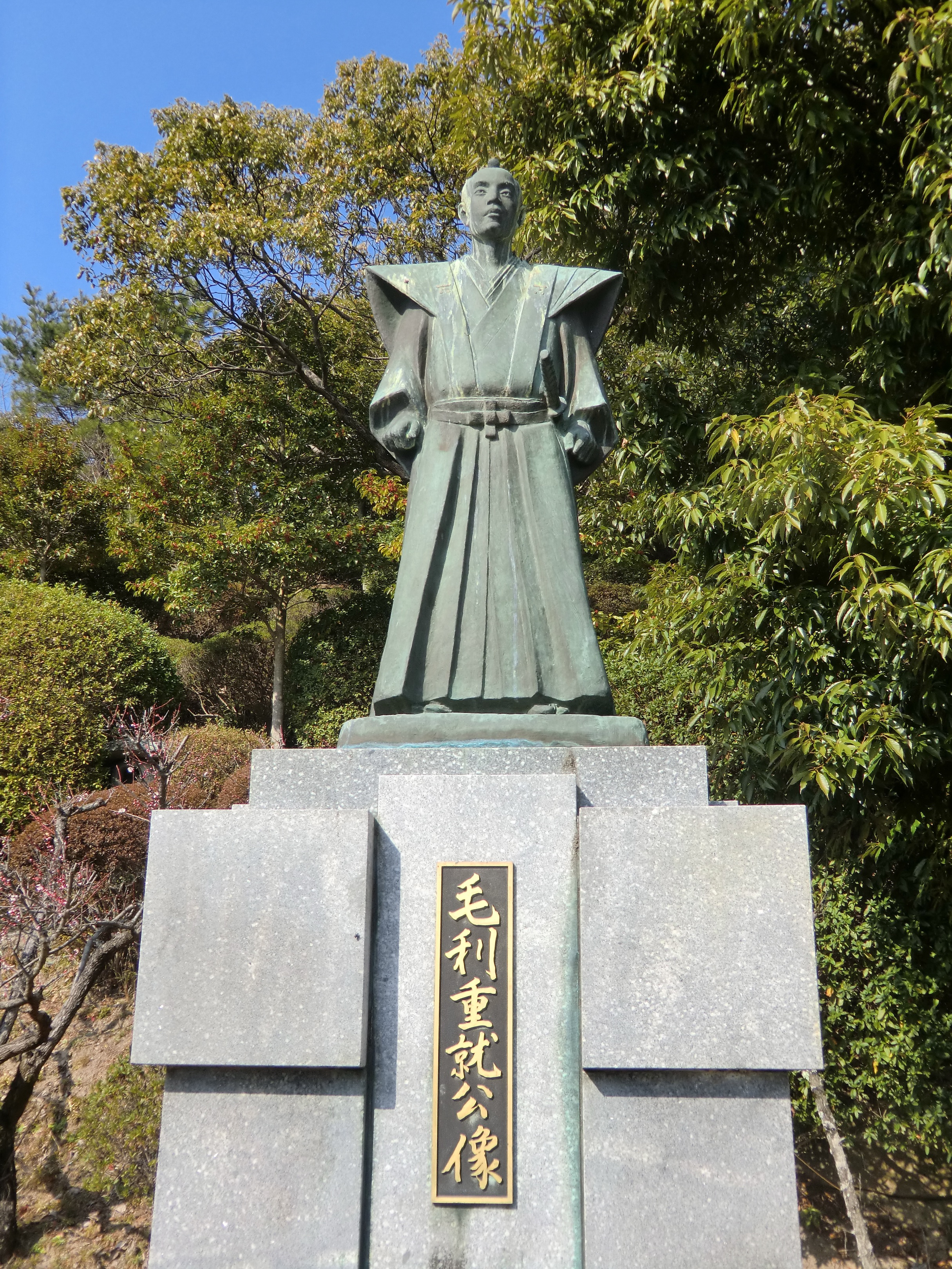 天神山（防府市）公園にある毛利重就像